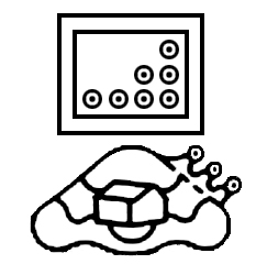 Det aztekiske skrifttegnet som representerer Chiconcuac i delstaten México